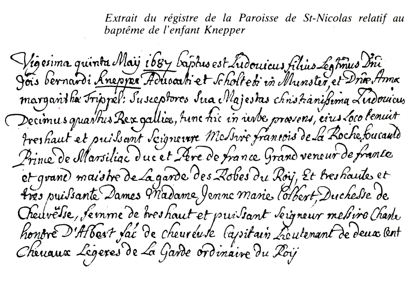 Acte du baptême de Louis Knepper à l'église St-Nicolas à Luxembourg-ville. Louis XIV, qui séjournait dans la ville, avait accepté d'être le parrain de l'enfant.